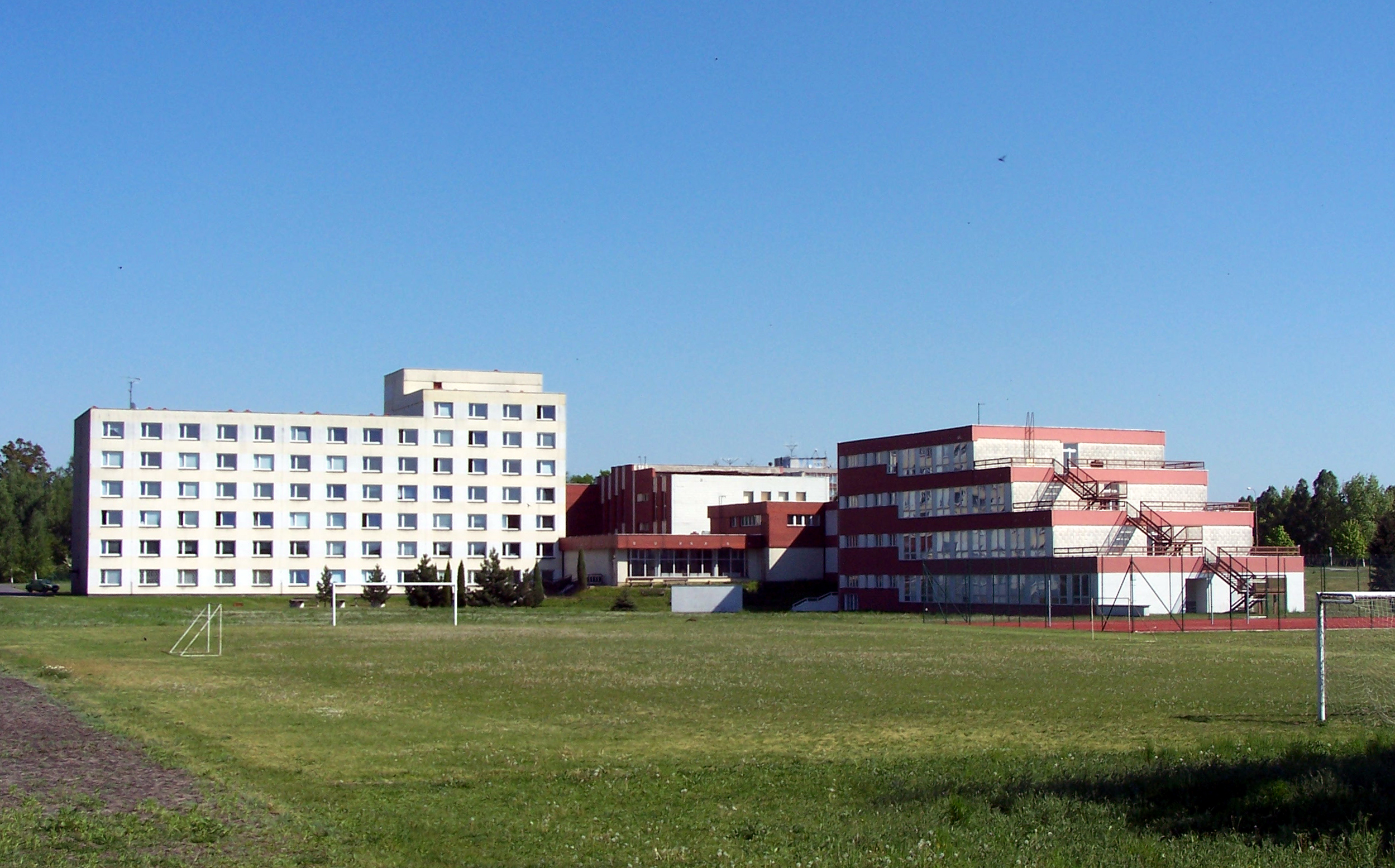 Fakulta zdravotnických studií UPa. GPS: Loc: 50°1'20.187"N, 15°48'19.507"E